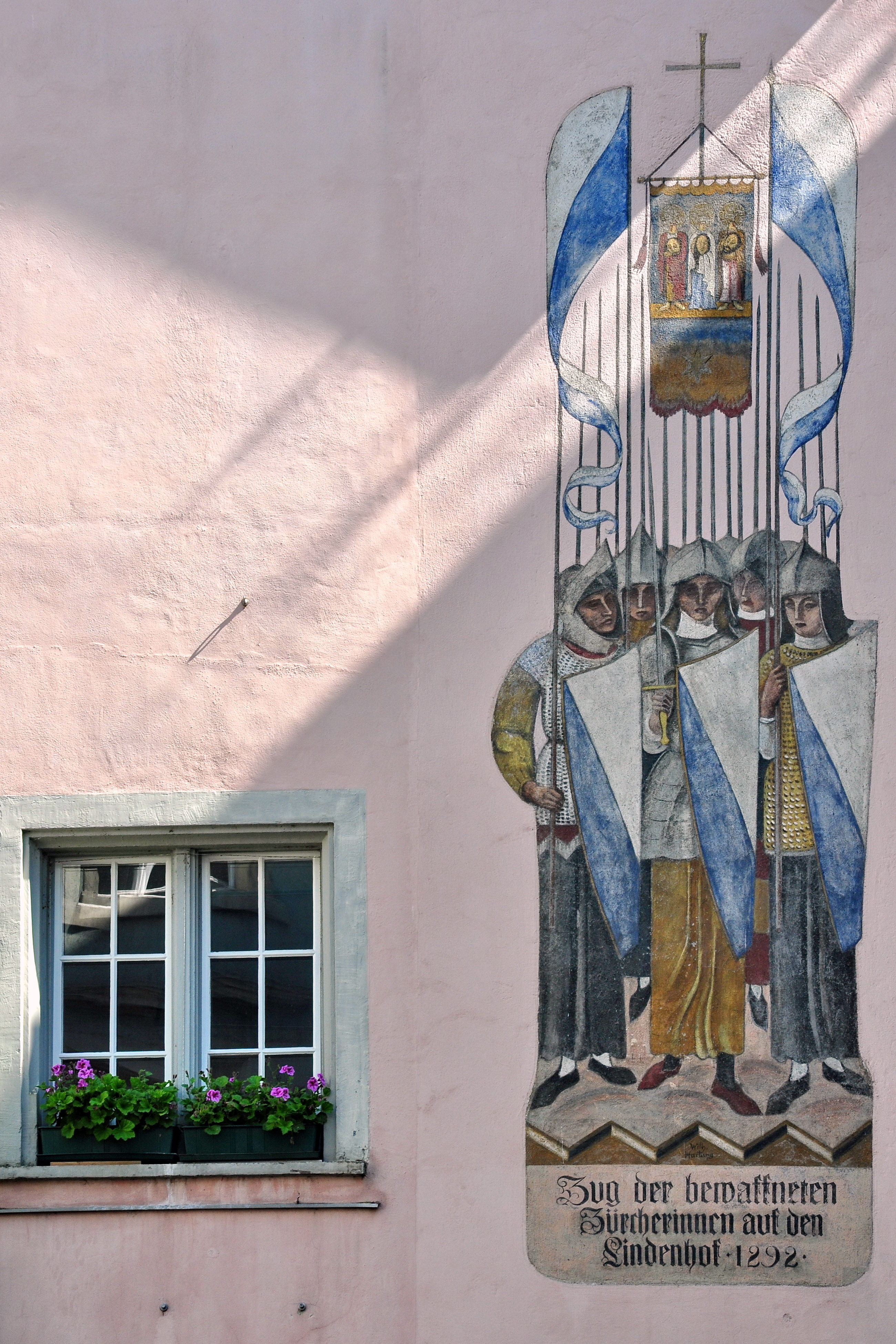 Haus zum Leoparden, Strehlgasse in Zürich-Lindenhof (Switzerland)